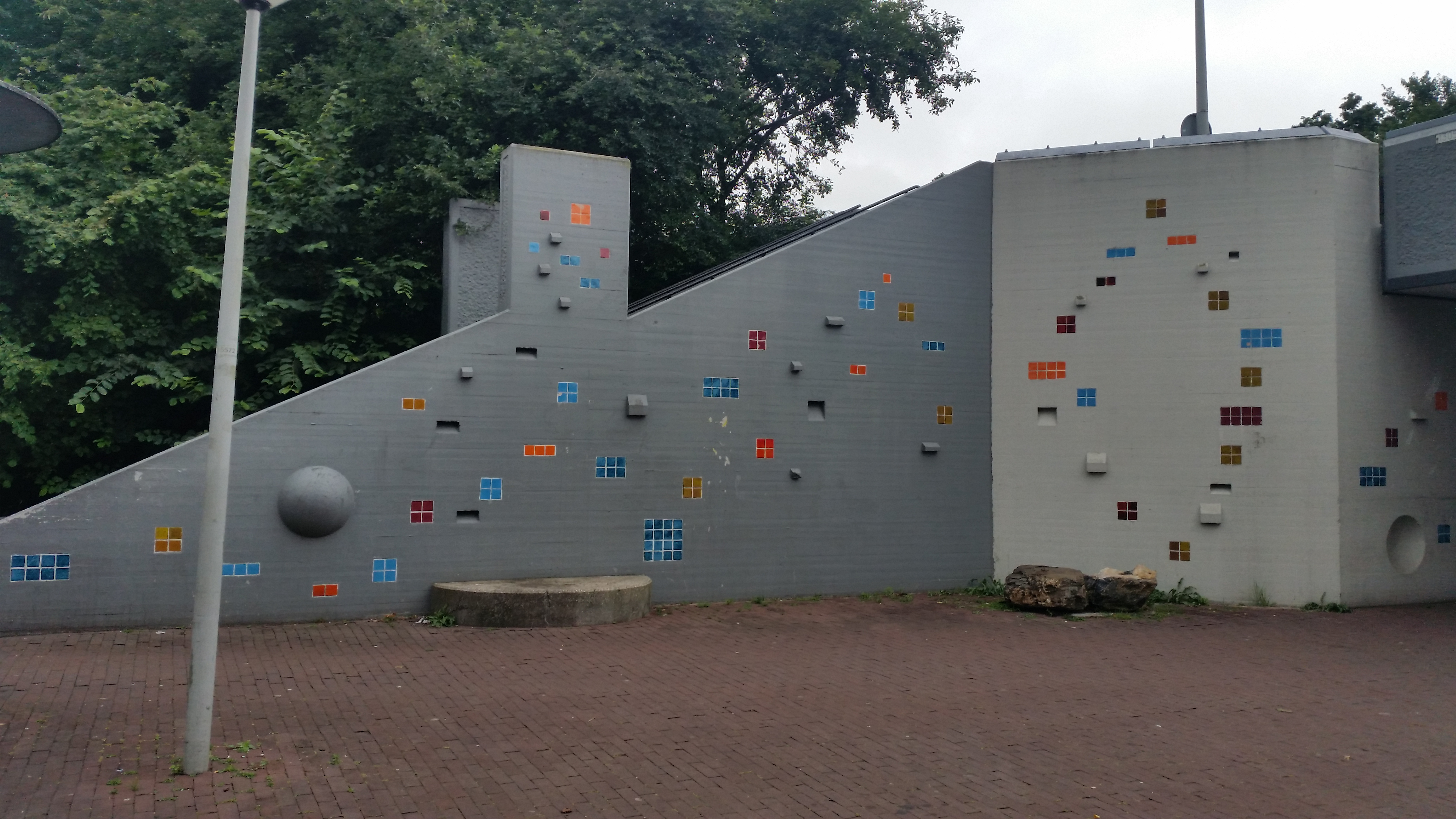 Versieringen van Ongenae op Brug 1305, Holendrechtpleinbrug